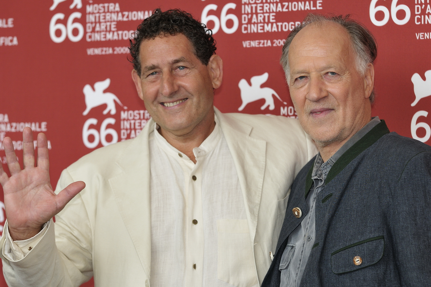 66ème Festival du Cinéma de Venise (Mostra), 4ème jour (05/09/2009) Photocall avec Michael Shannon et le réalisateur Werner Herzog pour le film (surprise) : My son my son what have you done ?